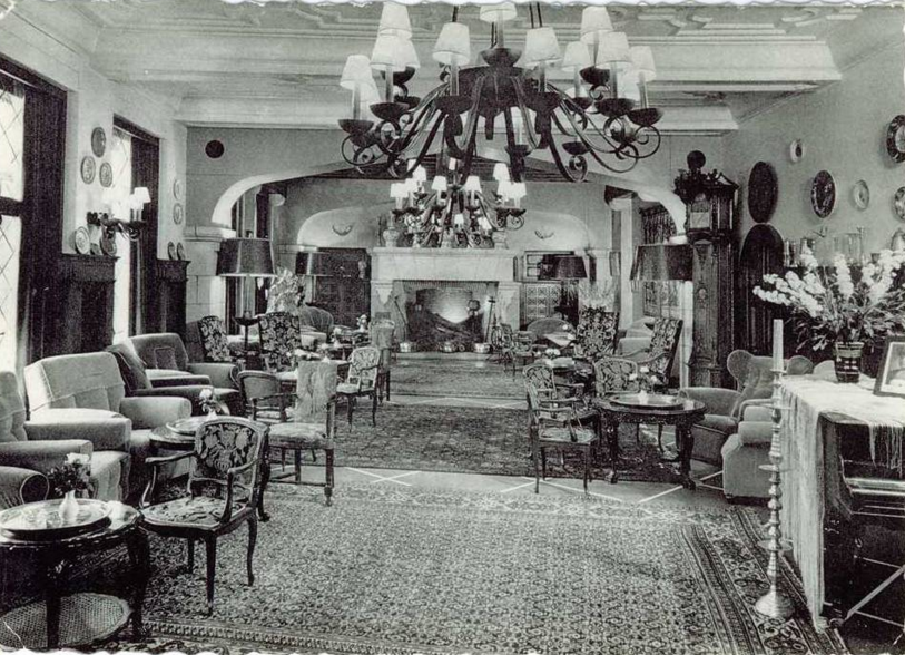 Le Grand Veneur, voormalig salon